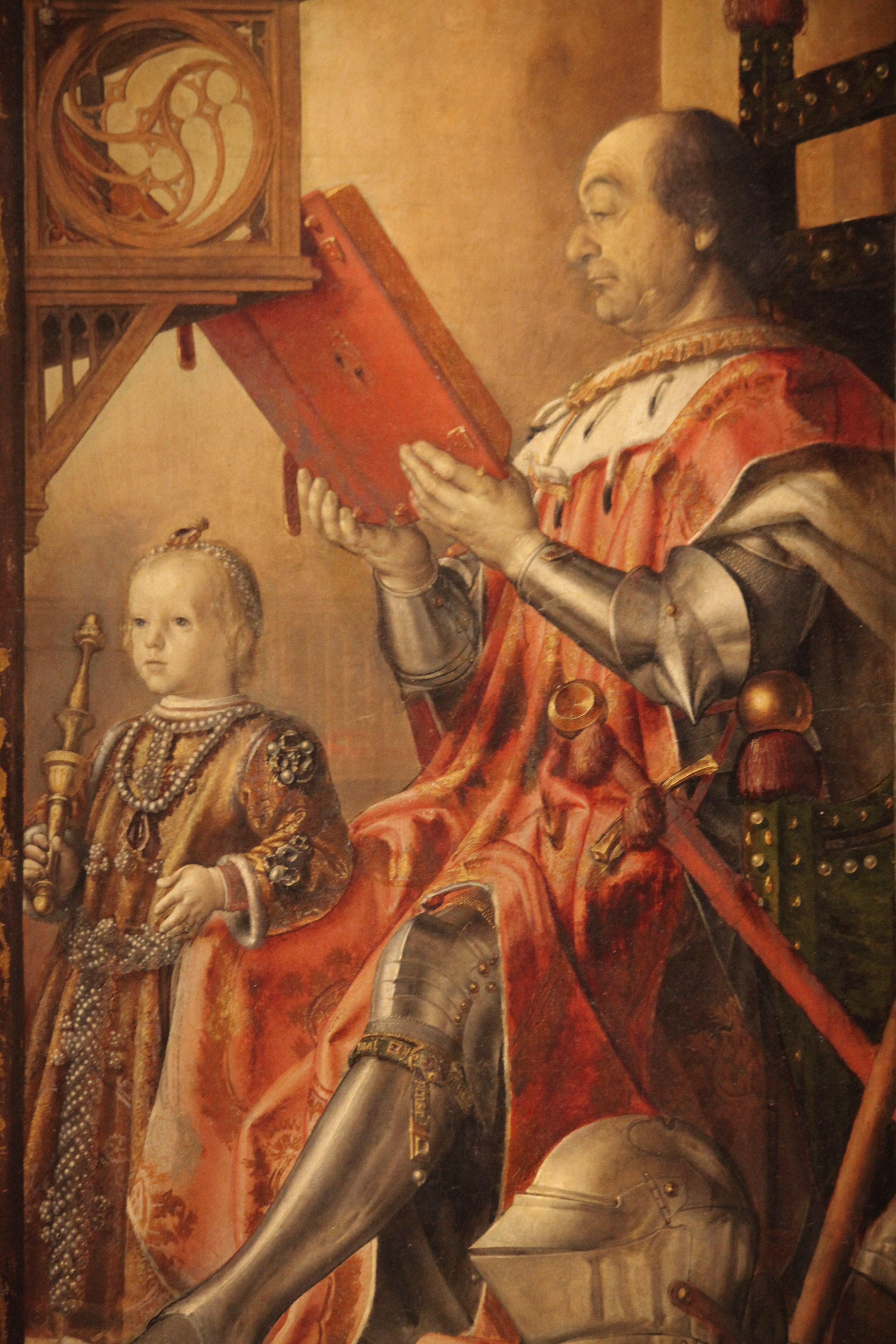 Palazzo Ducale di Urbino - Galleria Nazionale delle Marche - MIBAC This is a photo of a monument which is part of cultural heritage of Italy.